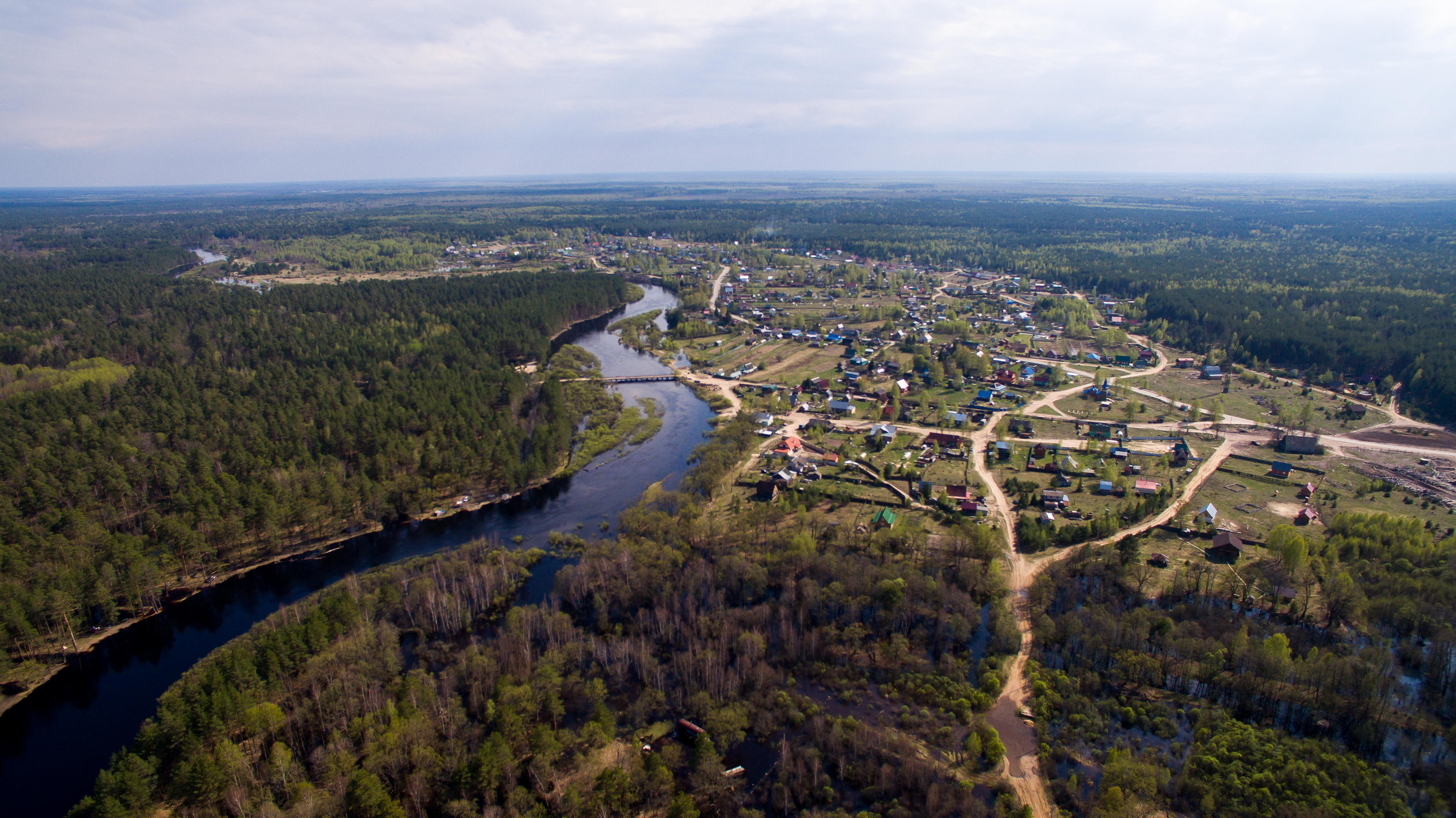 Национальный парк «Мещерский»: Парк находится в Рязанской области, охватывает Клепиковские озера, прилегающие к ним болота, долину речки Пры - притока Оки, а также систему верховых болот и мелководных озер на водоразделе Солотчи и Пры. Располагается на юге центральной части Мещерской низменности,Рязанский район, Рязанская область This image is related to the protected area of Russia number 6200114